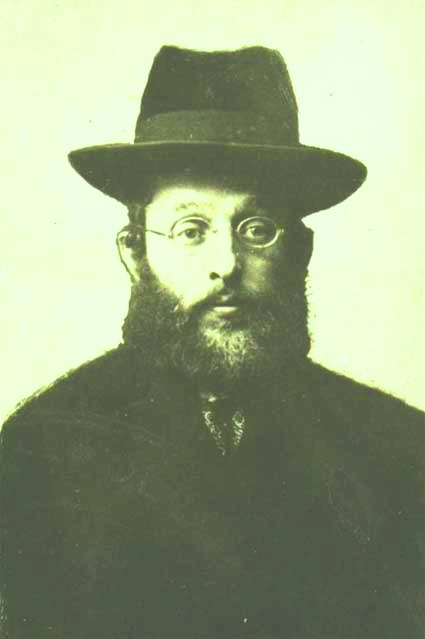 רבי אברהם אלימלך מקרלין